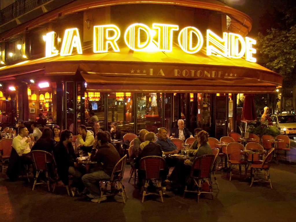 Paris